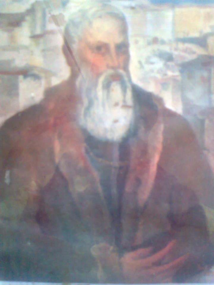 Портрет на Хаджи Юрдан Брадата в Плаковския манстир